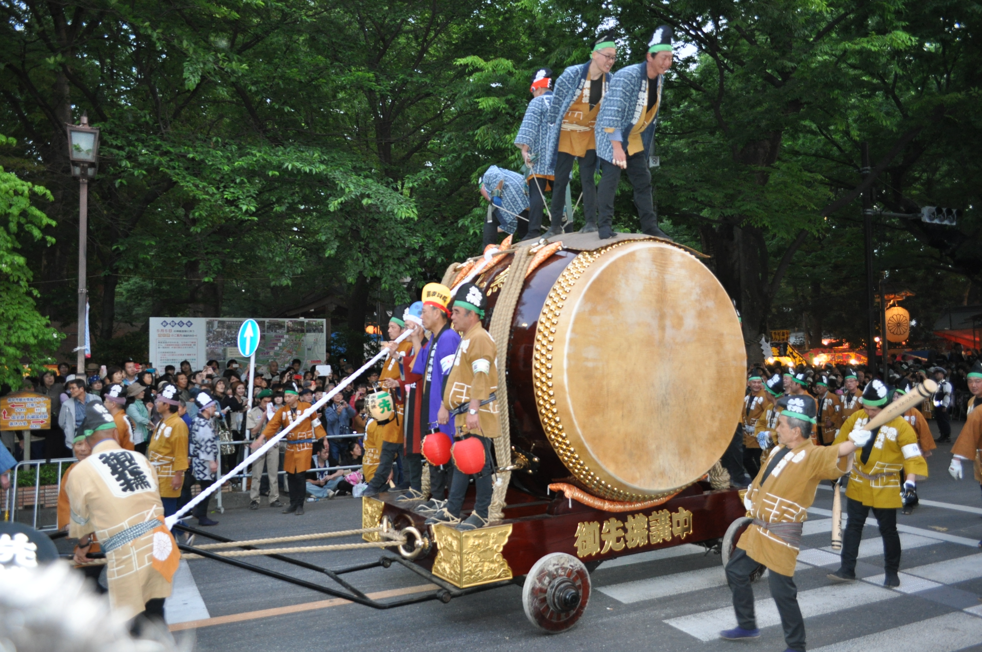 くらやみまつりの大太鼓渡御